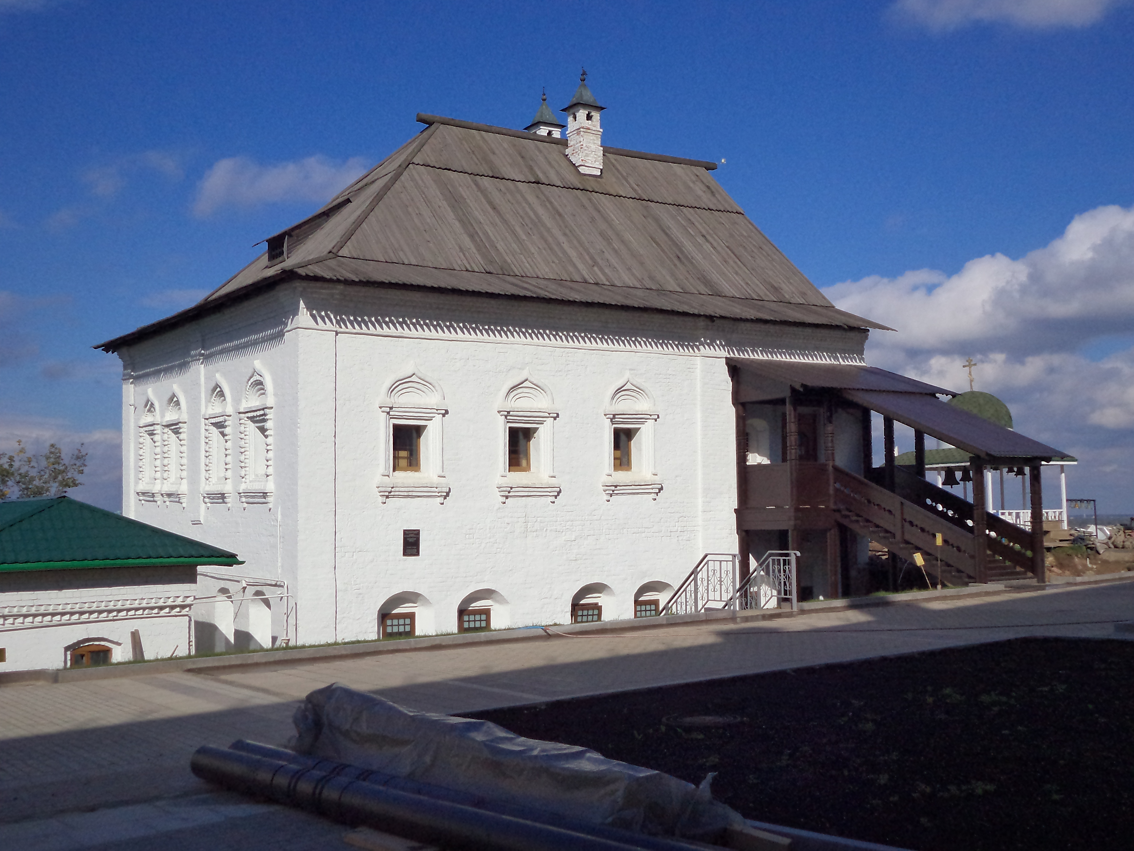 Корпус больничный: переулок Мельничный, 8, 10, 12, 14, Похвалинский съезд, 5, Нижний Новгород, Нижегородская область